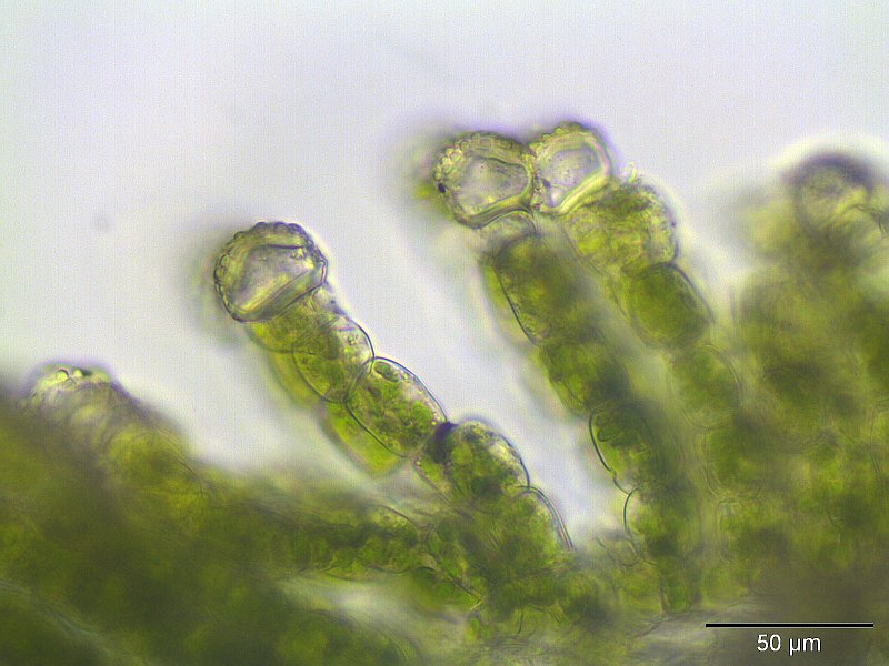 Große Filzmütze (Pogonatum urnigerum), papillöse Endzellen der Assimilationslamellen, ~400x vergrößert